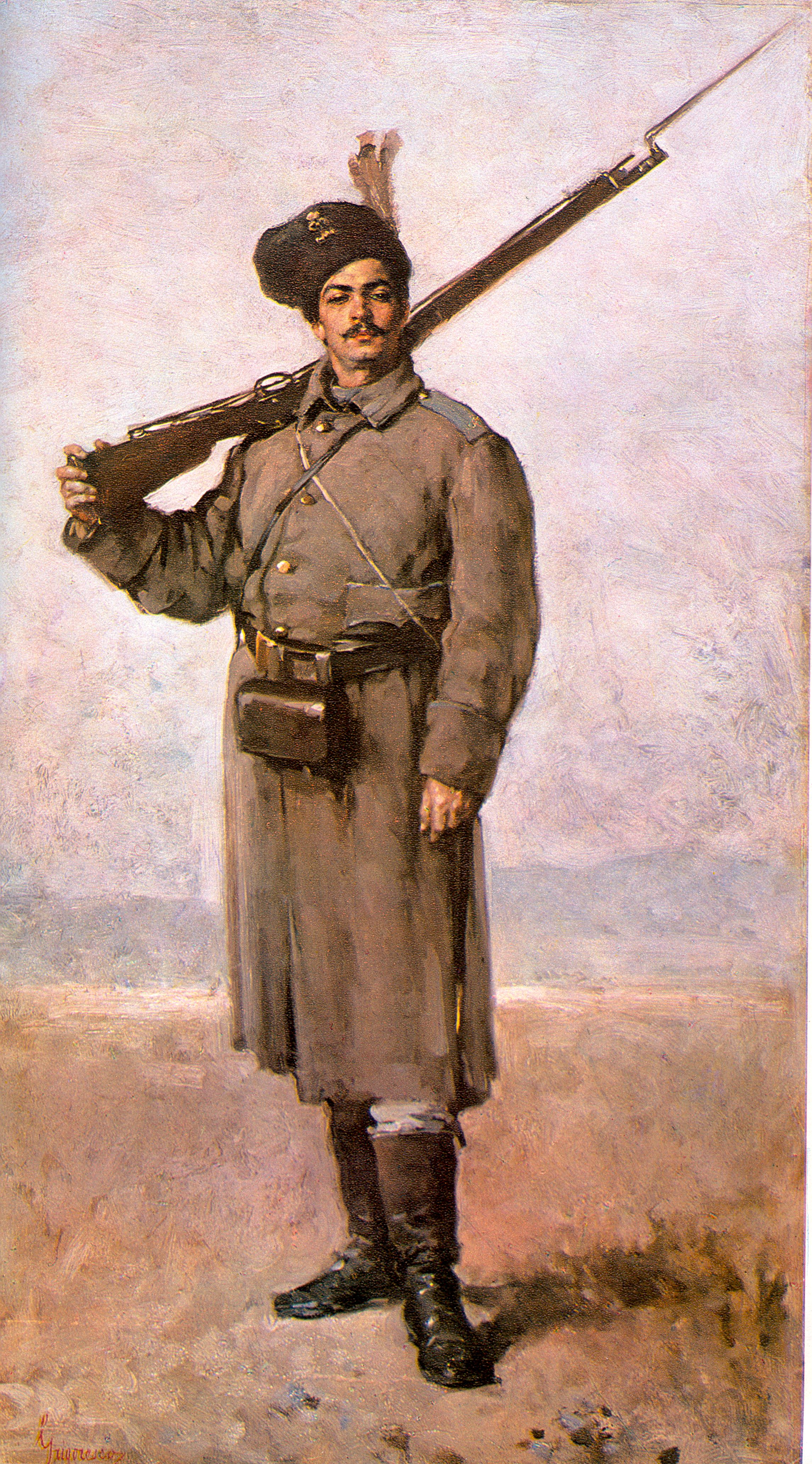 Nicolae Grigorescu - Dorobanţul